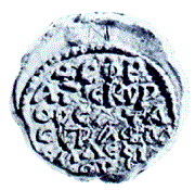 Sello de plomo de Alejo Estrategopoulos